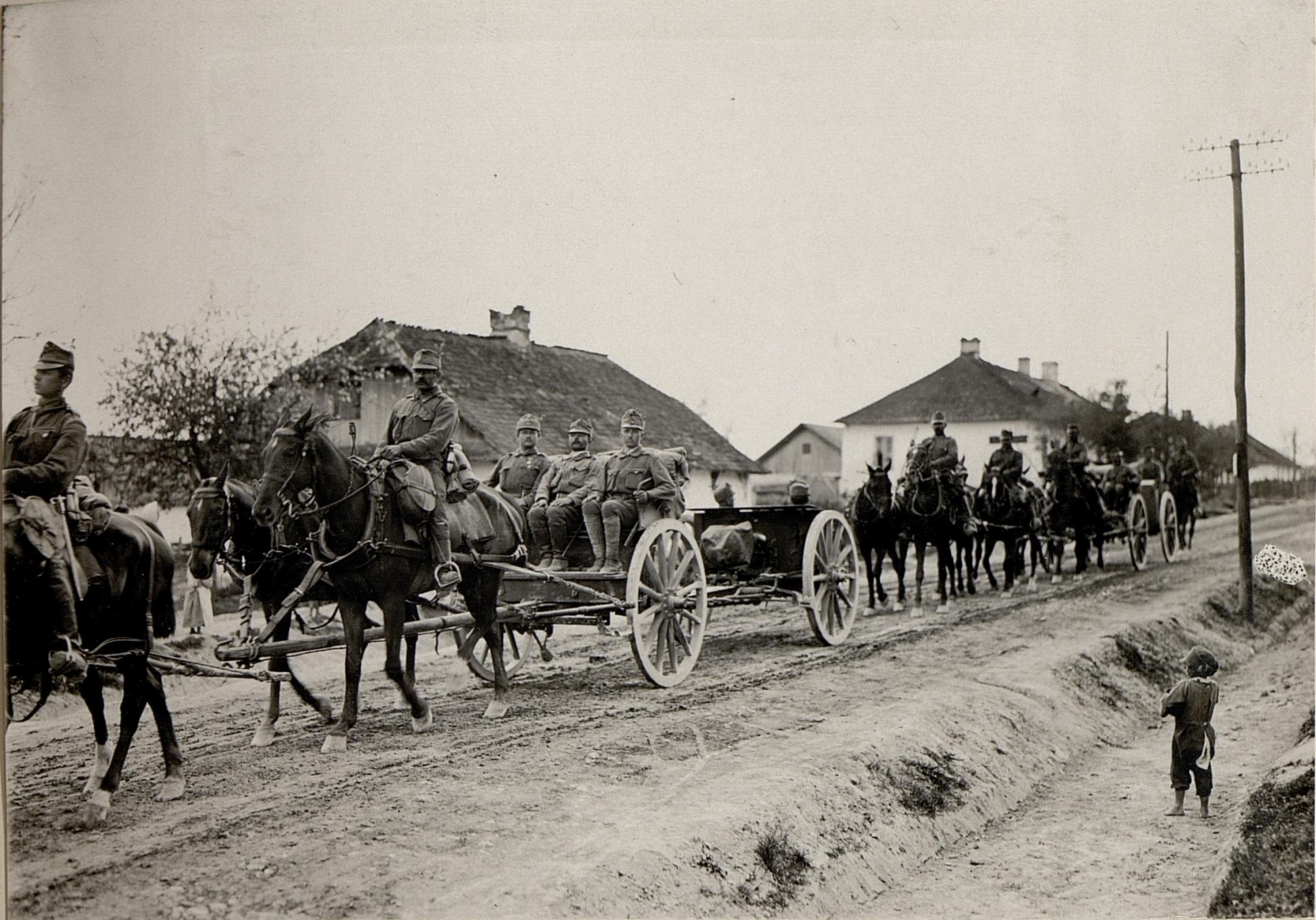 Artillerie auf dem Wege zur Stellung